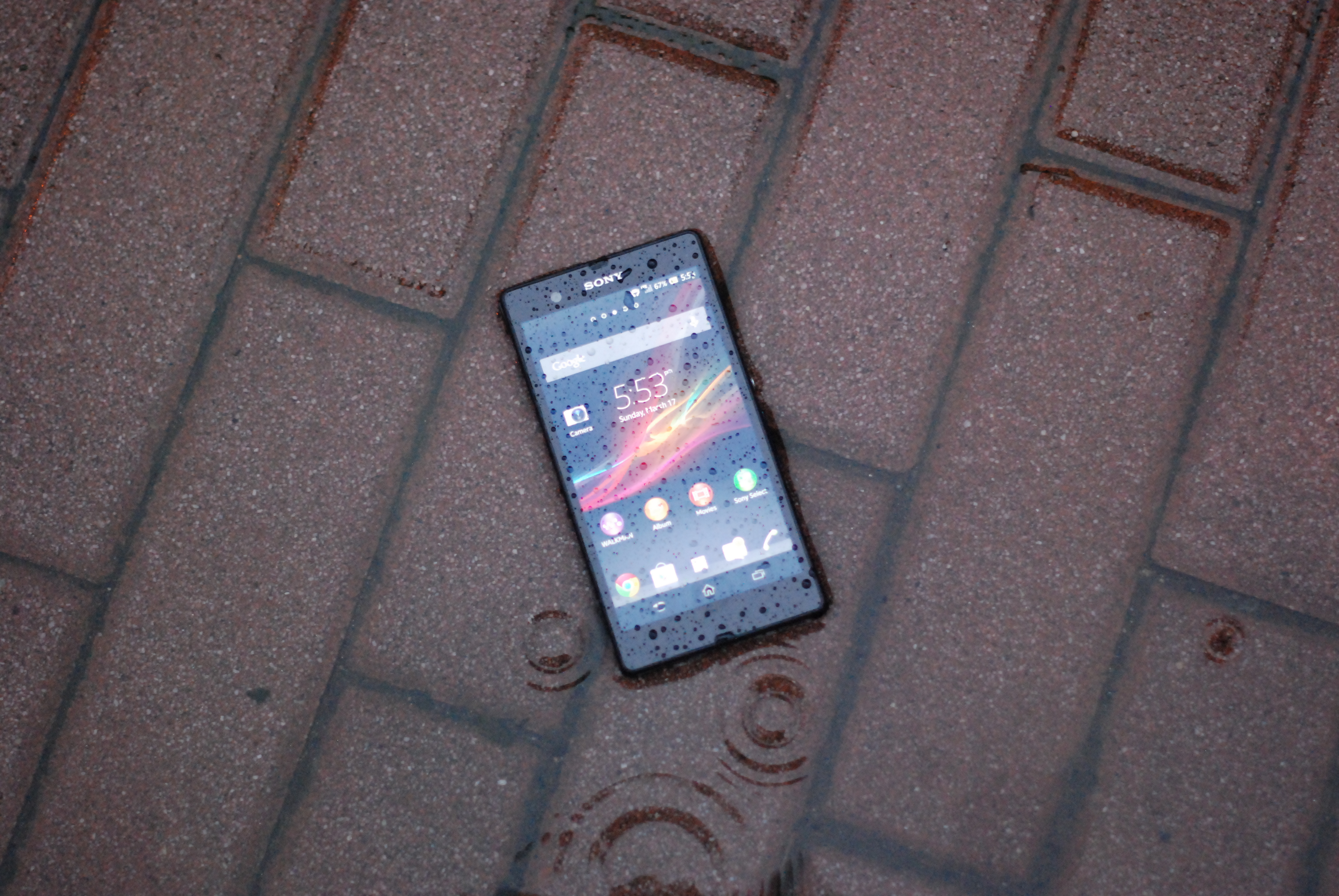 Sony Xperia Z